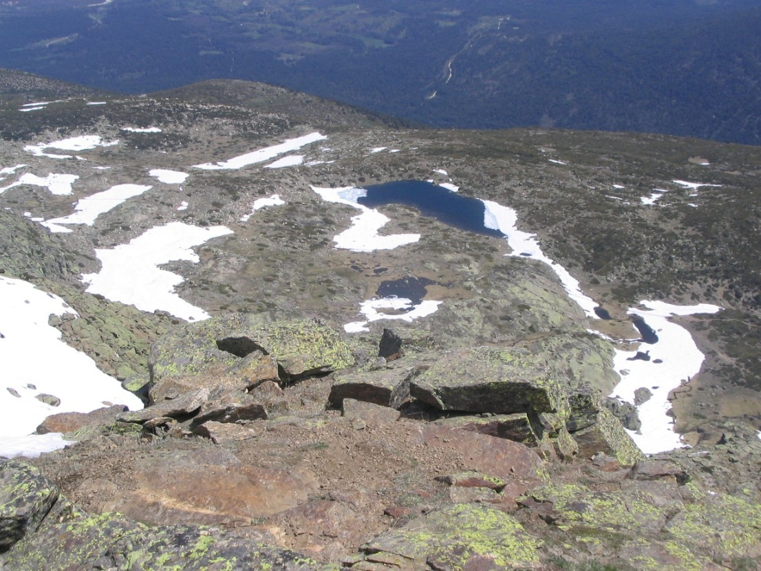 Laguna de Los Claveles (Parque Natural de Peñalara)